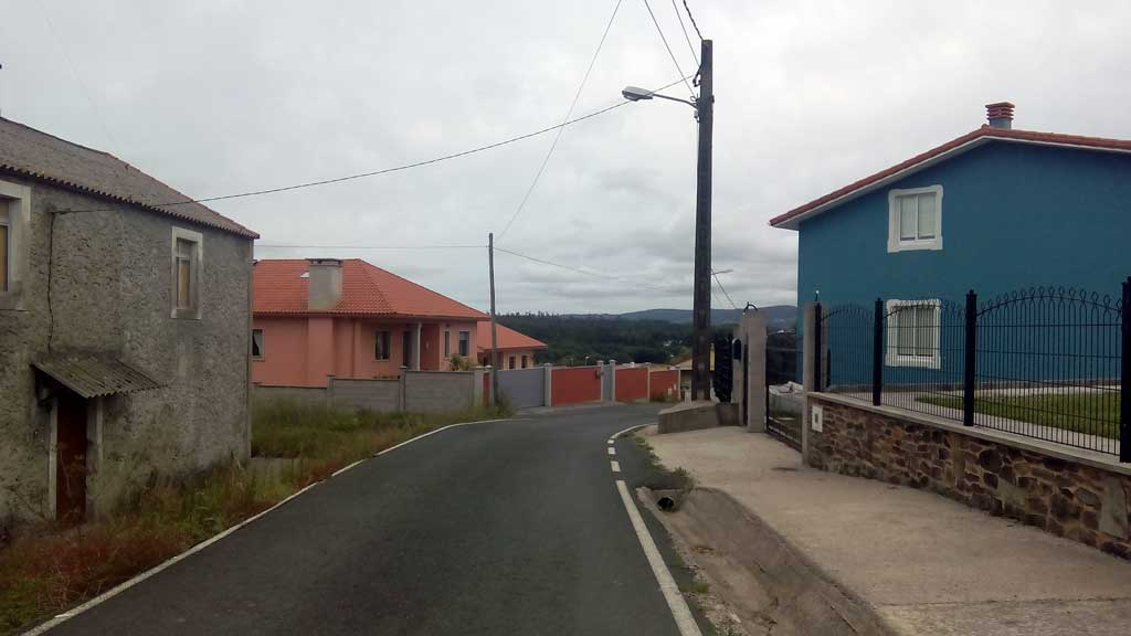 Imaxe do Bidueiro.